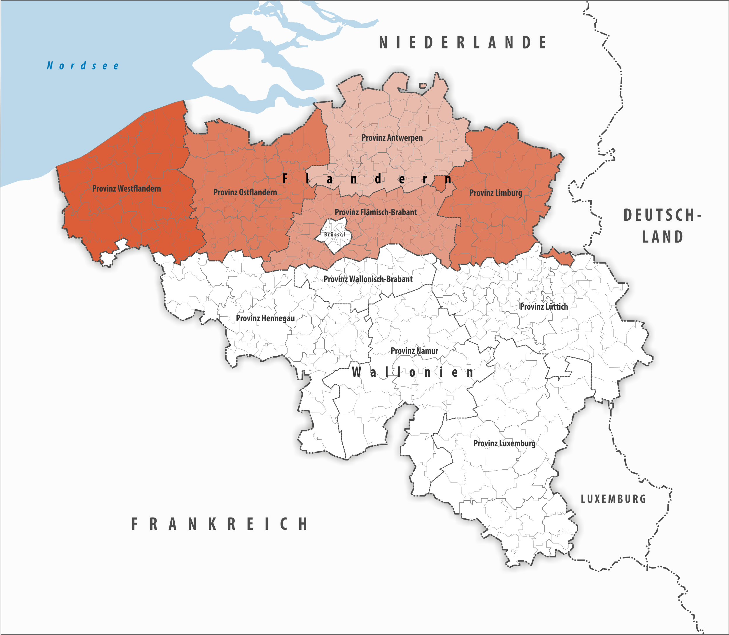 Region Flandern